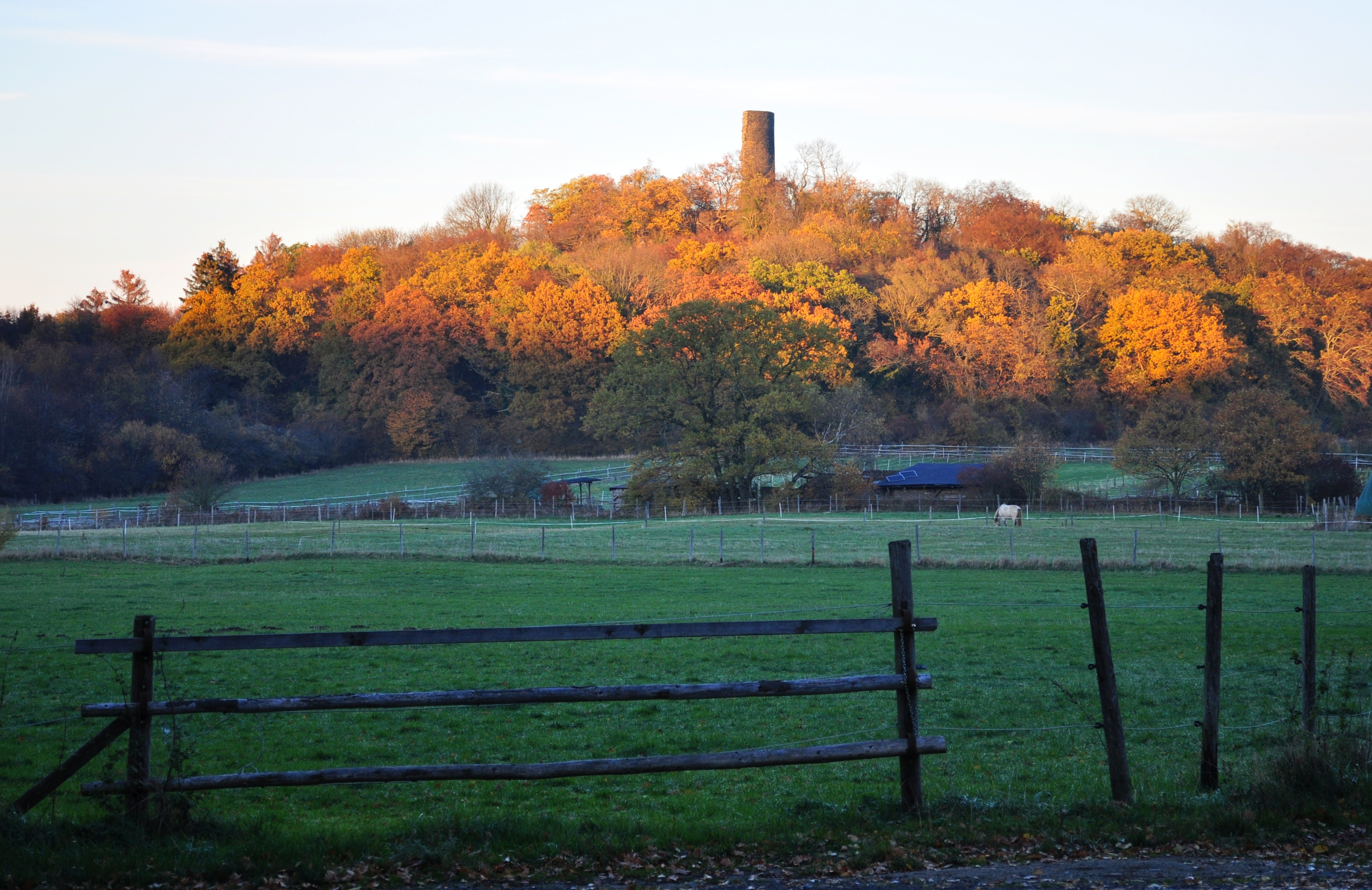 Tomburg im Herbst 2018